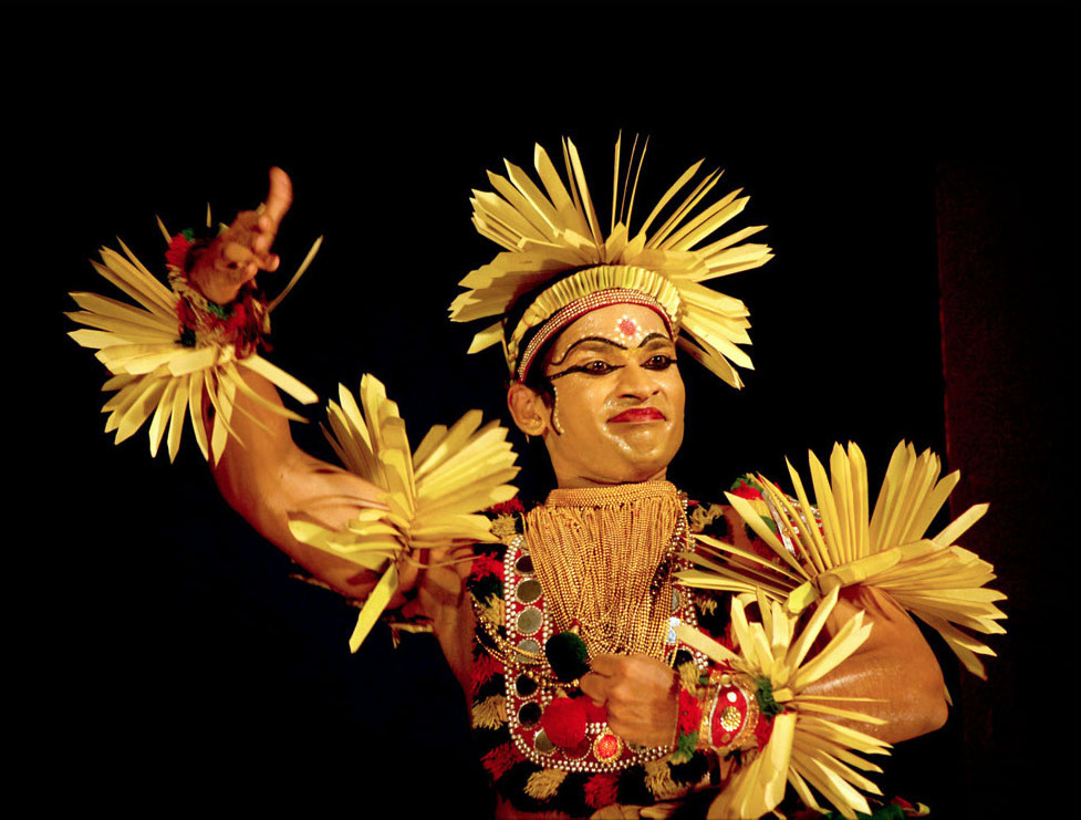 Sheethankan Thullal ശീതങ്കന്‍ തുള്ളല്‍